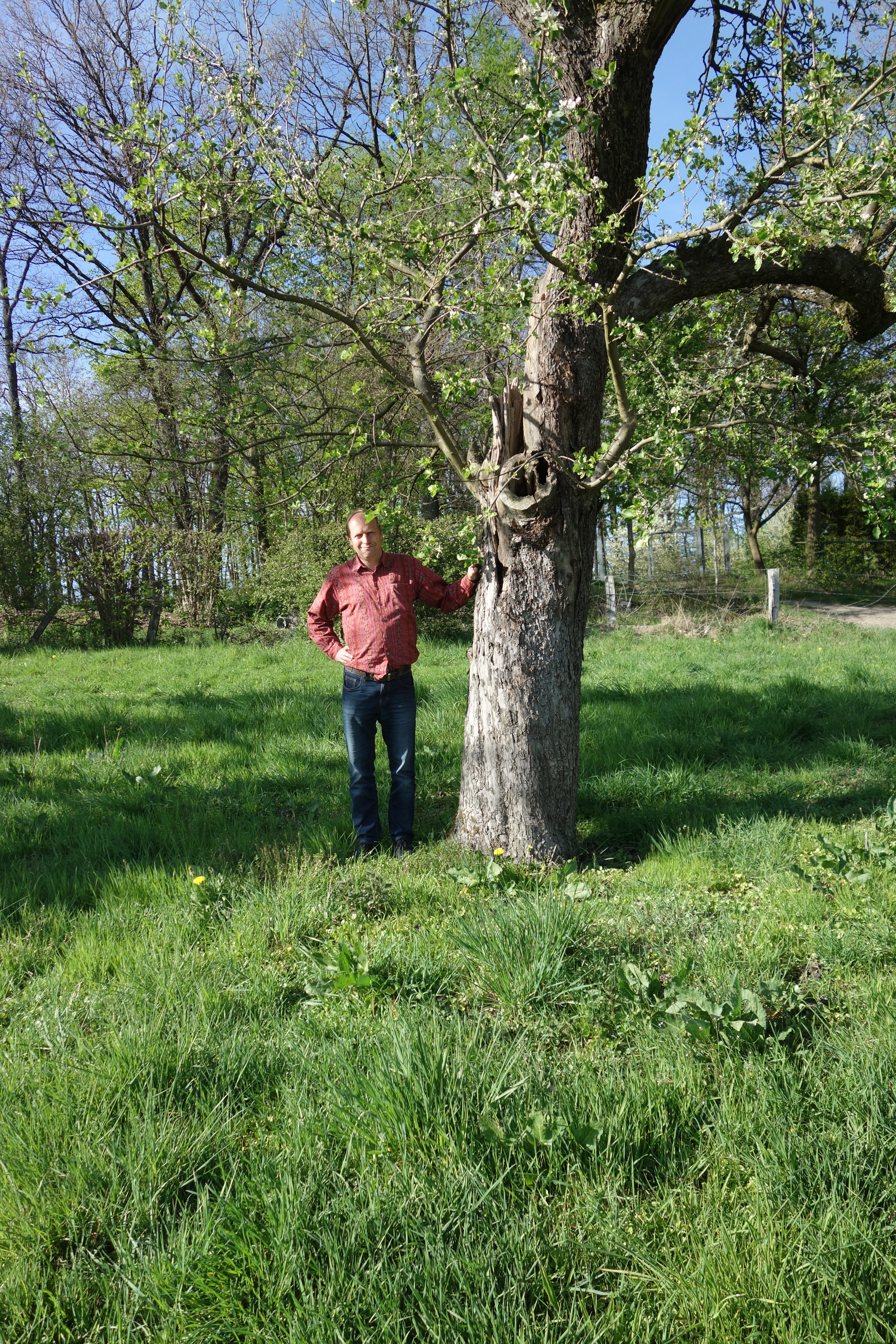 Boskop Apfelbaum, eigentlich Schöner aus Boskoop, im Geschützten Landschaftsbestandteil Apfelhof Am Franziskus.